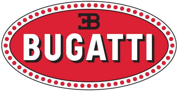 Logo de Bugatti